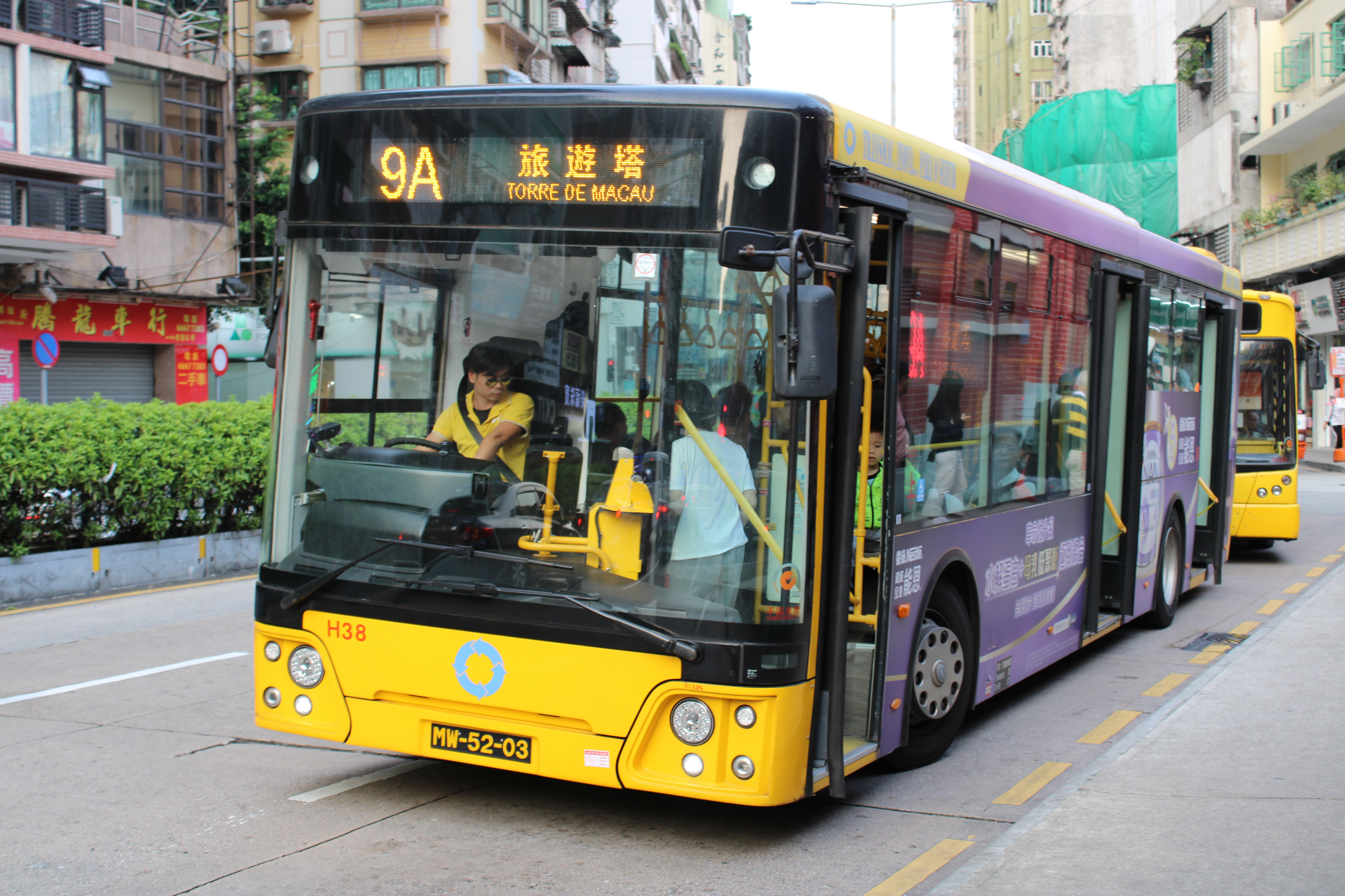 新福利蘇州金龍KLQ6115GQ行駛9A路線。